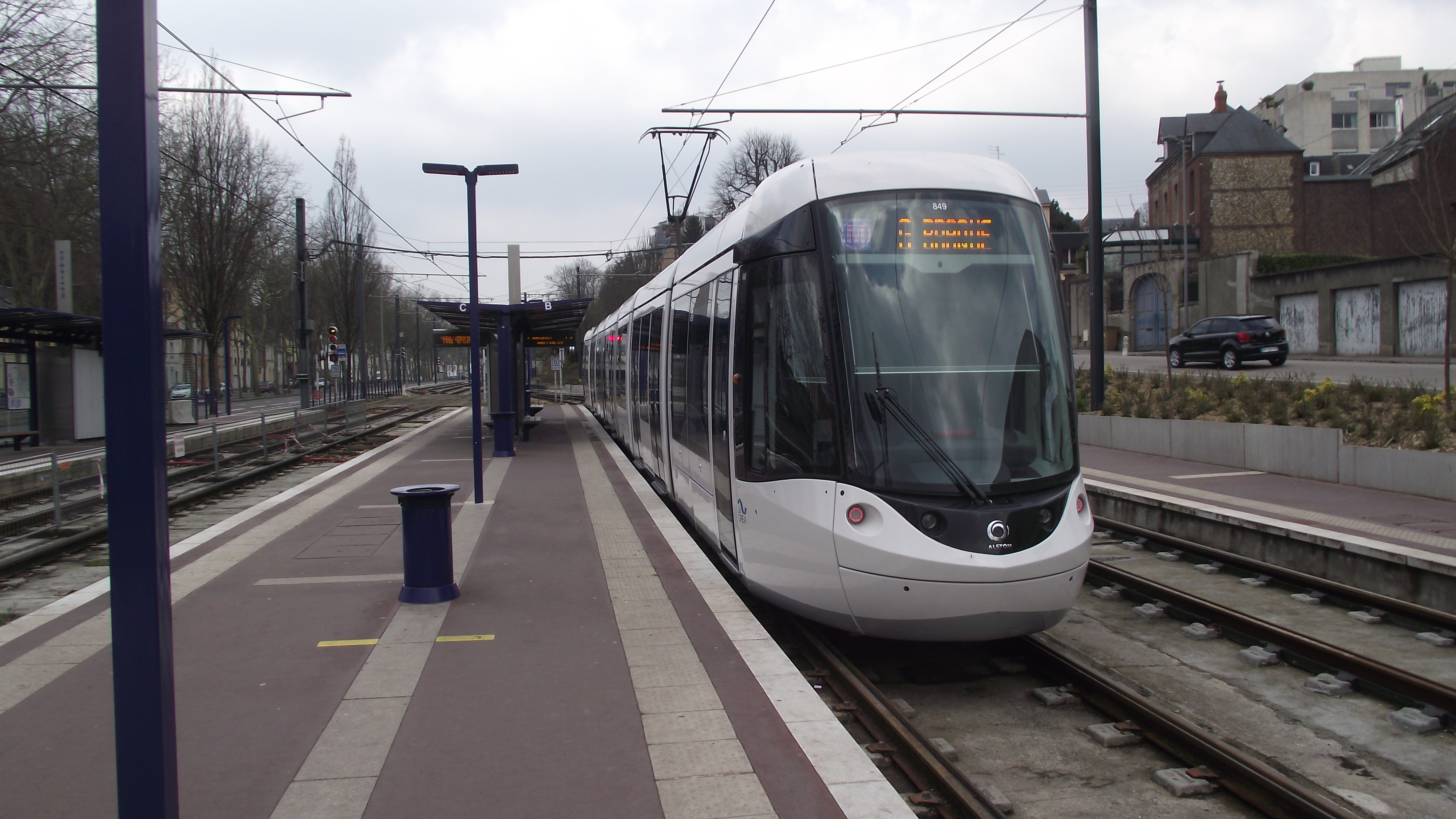 Citadis tram bij het stadseindpunt Boulingrin